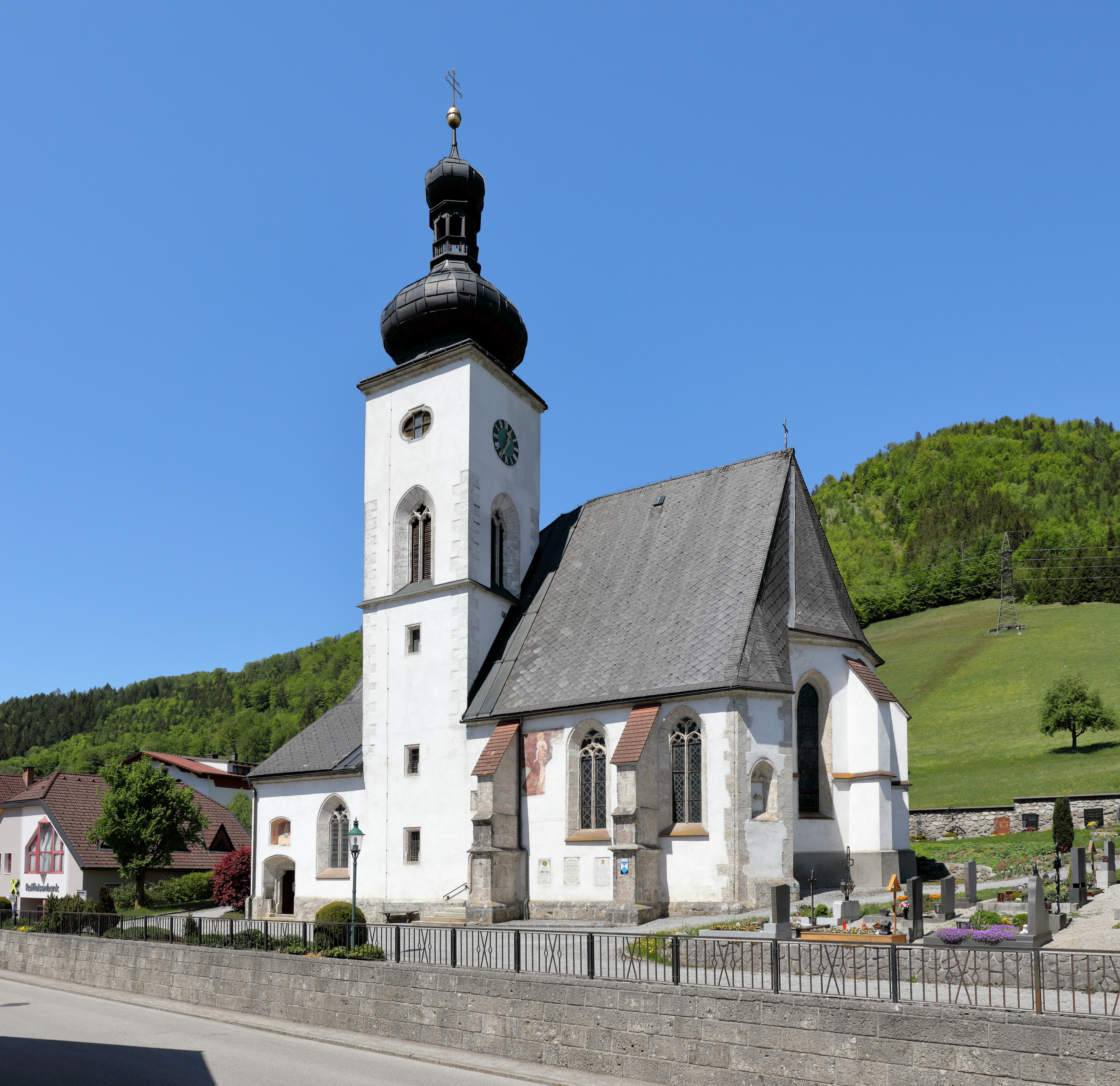 Ostsüdostansicht der röm.-kath. Pfarrkirche hl. Andreas in der oberösterreichischen Marktgemeinde Gaflenz.